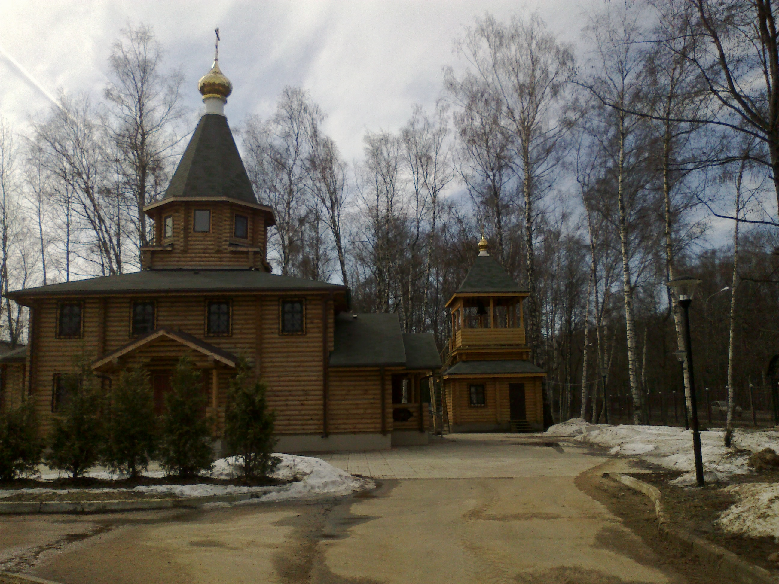 Храм в честь святителя Луки